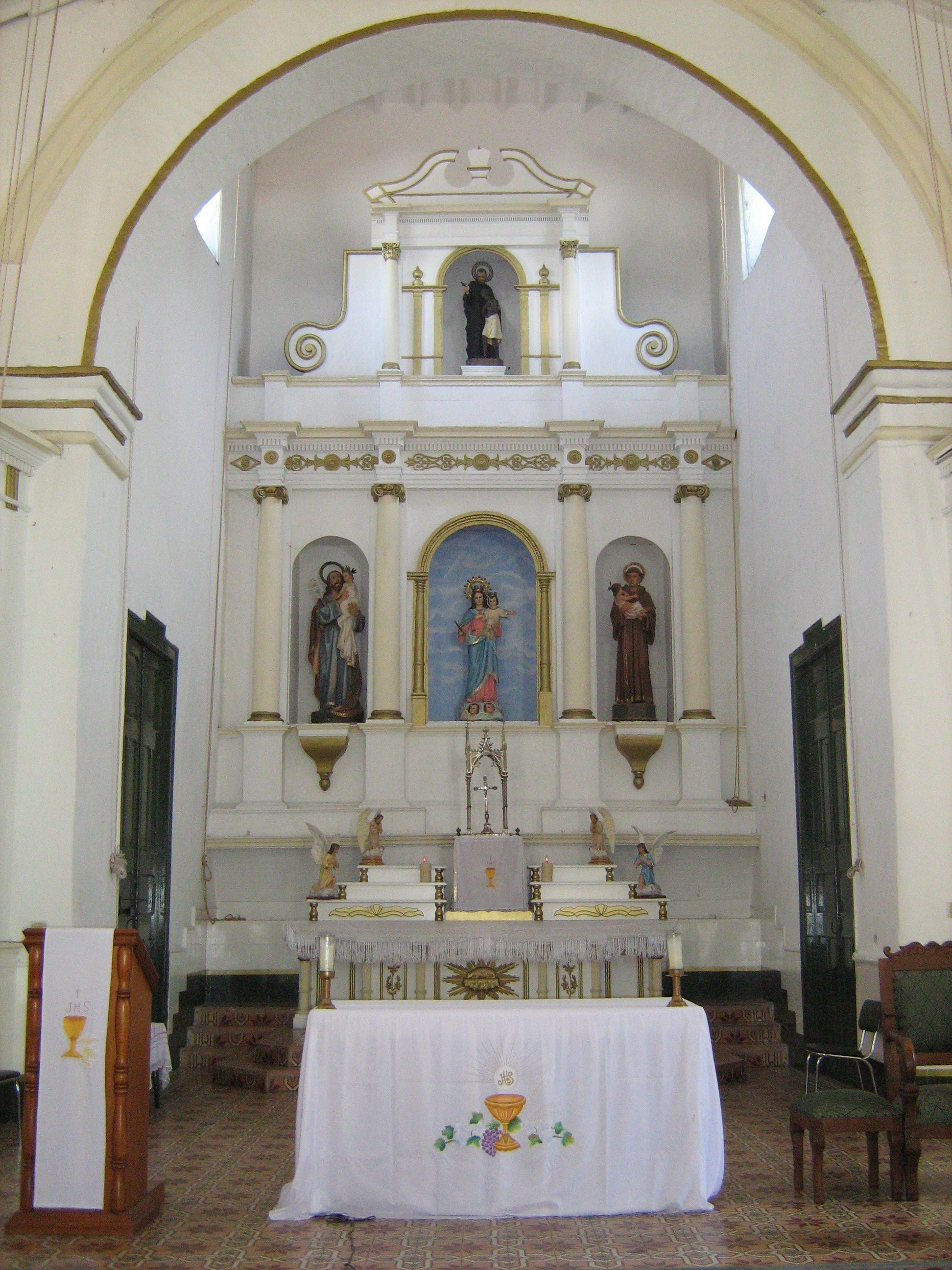 Capilla de María Auxiliadora en el municipio de Barbosa, Antioquia, Colombia.